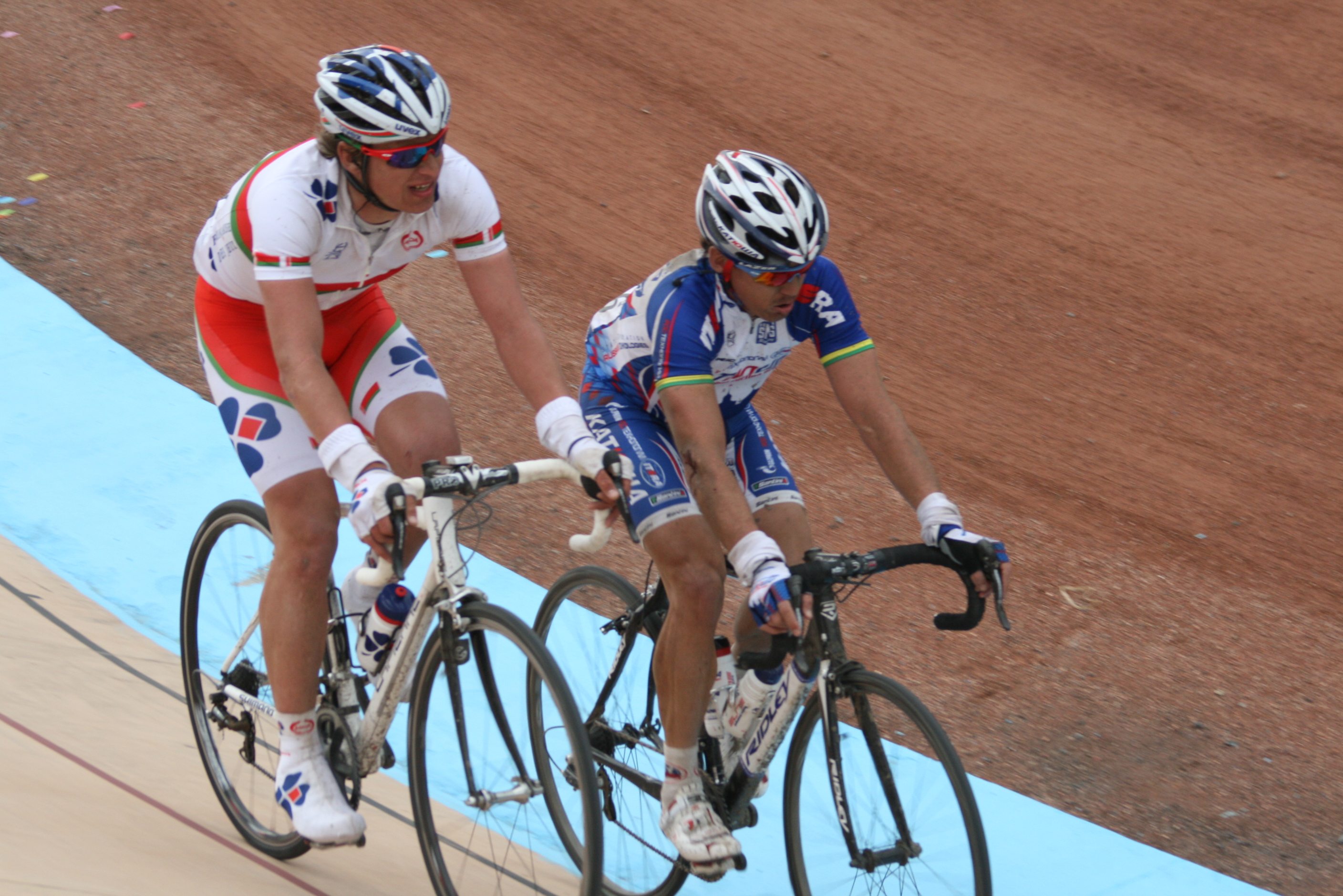 Yauheni Hutarovich et Robbie McEwen à l'arrivée de Paris-Roubaix 2010